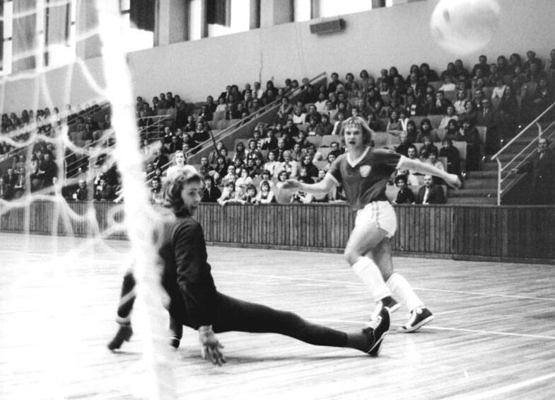 +ADN-ZB-Spremberg-26-12-75-ba Berlin: Fußballturnier in der Dynamo-Halle- In der Berliner Dynamo-Halle standen sich am 26.12. Fußballmannschaften der DDR-Hauptstadt in einem Hallenturnier gegenüber. In dieser Szene der Begegnung BFC Dynamo II gegen 1. FC Union Berlin kann Dietmar Labes (BFC) den Ball nicht in dem vom Gerhard Weiß gehüteten Union-Tor unterbringen.